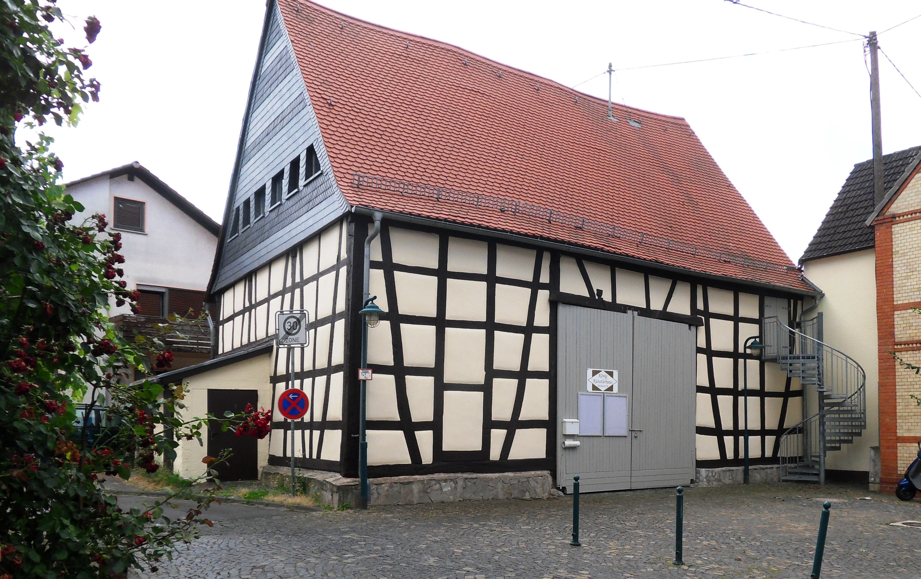 Die denkmalgeschützte Zehntscheune in Massenheim, Ecke Hauptstraße und Gartenstraße